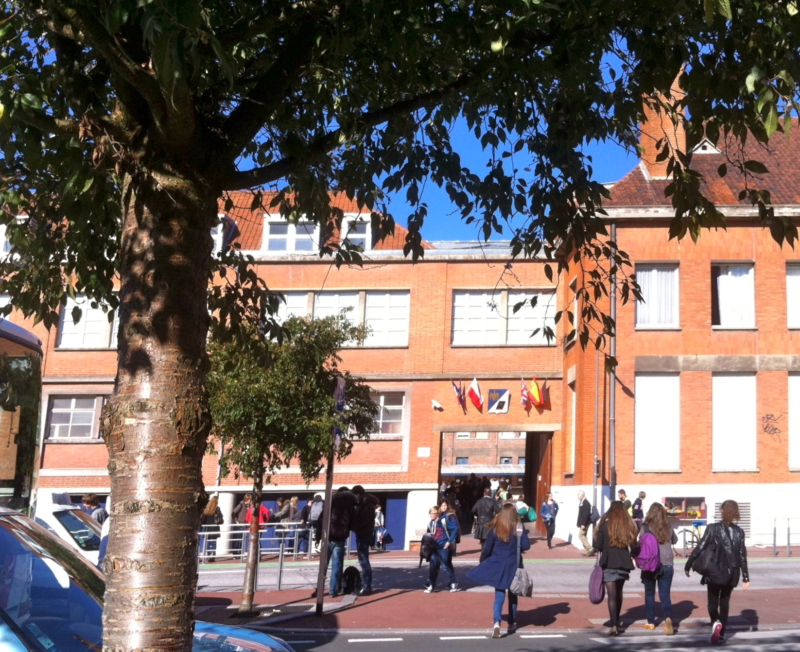 Entrée de l'Institution Saint-Jean de Douai (Nord, France).